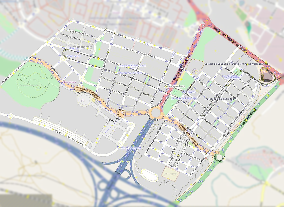 Mapa de Valdespartera, Zaragoza.